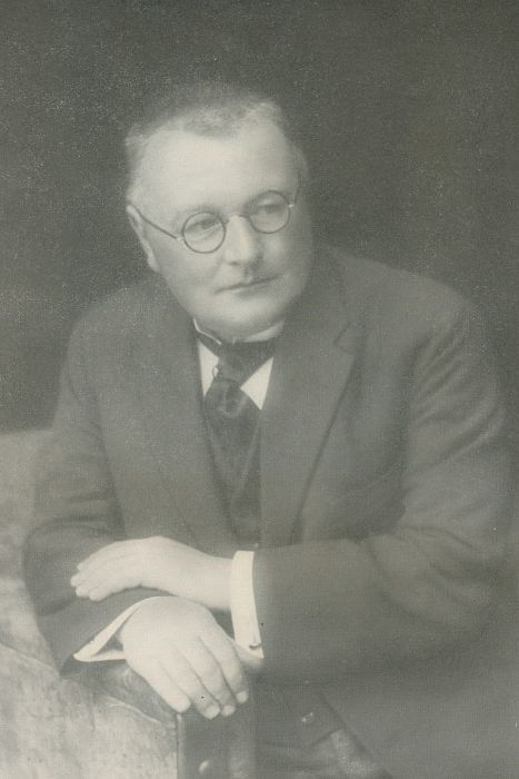 Alfred Maria Jelínek (1884-1932), český právník, hudební skladatel a sbormistr